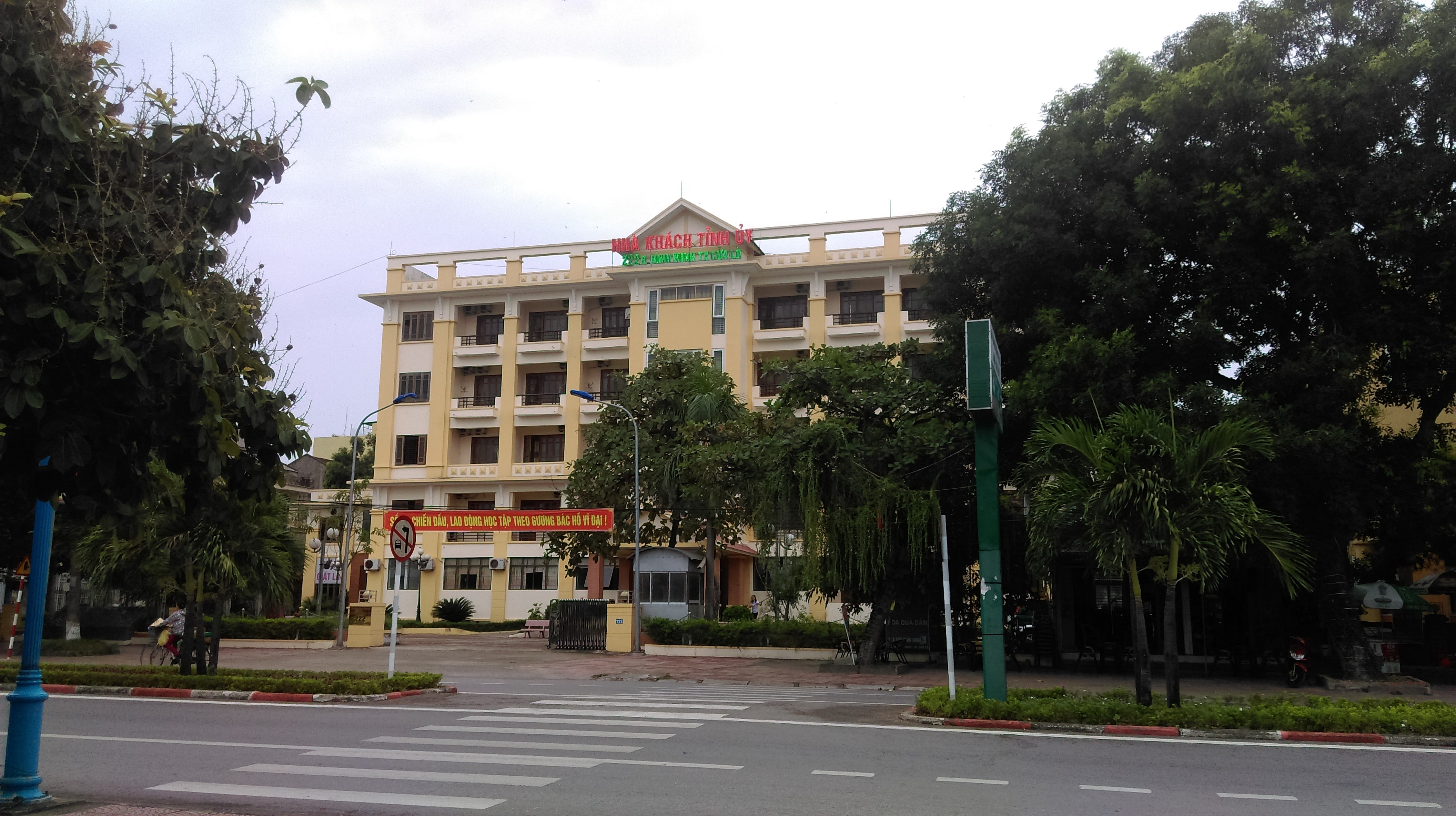 Nhà khách Tỉnh ủy tại Cửa Lò